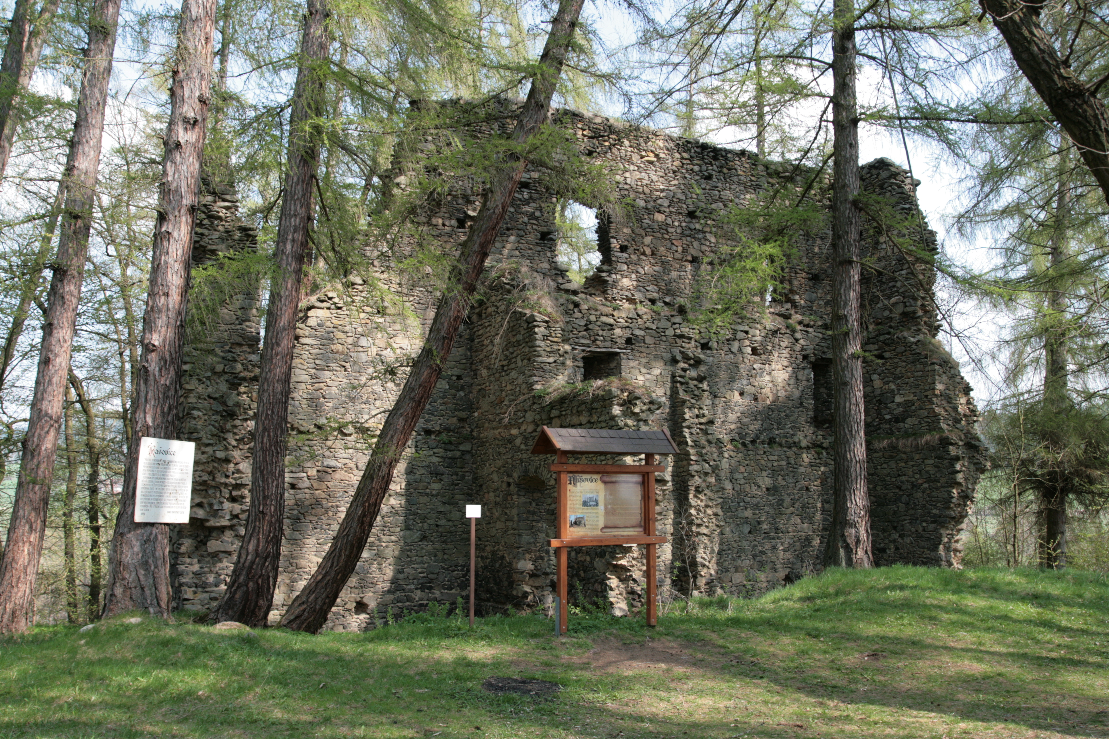 Vesnice Kašovice, část obce Hrádek u Sušice v okrese Klatovy. Zřícenina stejnojmenné tvrze na vrchu západně od vsi.